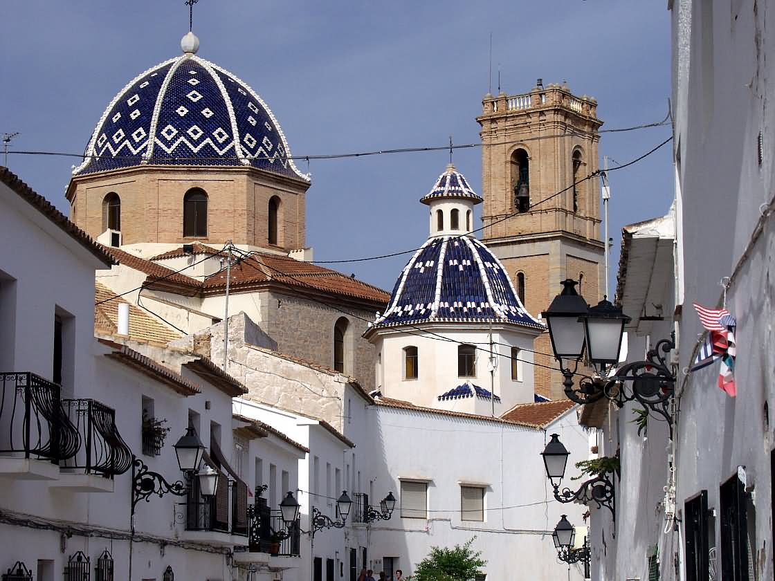 Calle del casco antiguo, con la iglesia de la Consolación al fondo